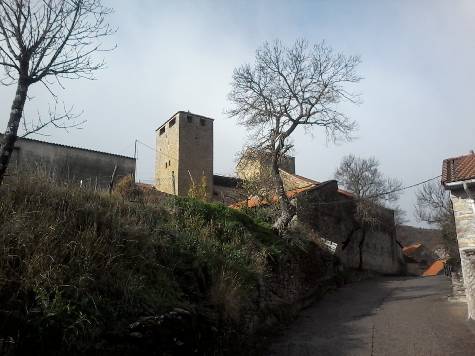 Castillo de Larrés- Huesca, España